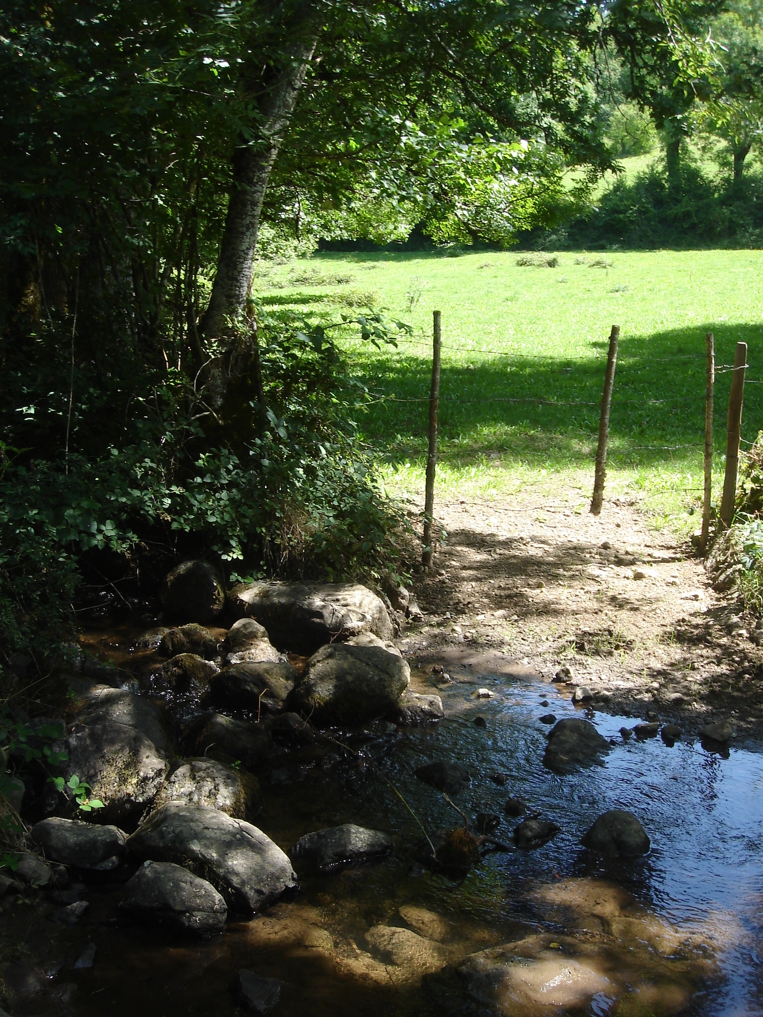 Rivière Baïse. Reilhaguet Reilhac (15) France.